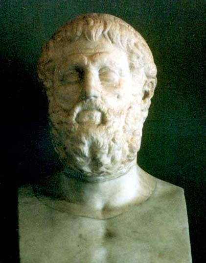 Sofocle, busto nei Musei Capitolini di Roma. Century ?